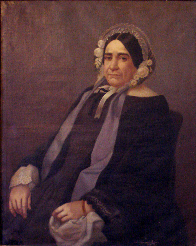 Sócia benemérita da Beneficência Portuguesa de Porto Alegre, Brazil.